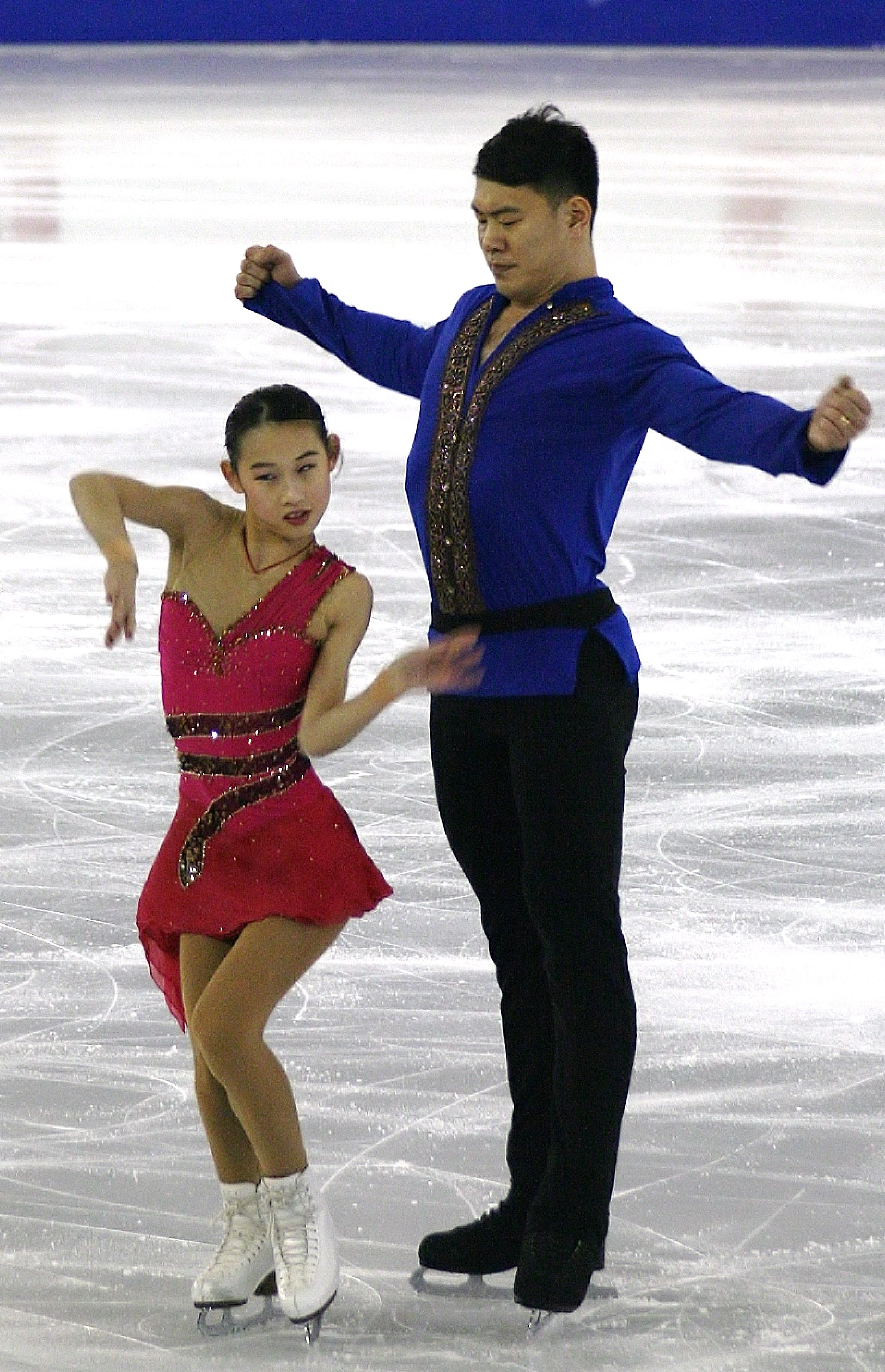 Пэн Чэн и Чжан Хао (Китай) на финале Гран-при по фигурному катанию 2014-2015.